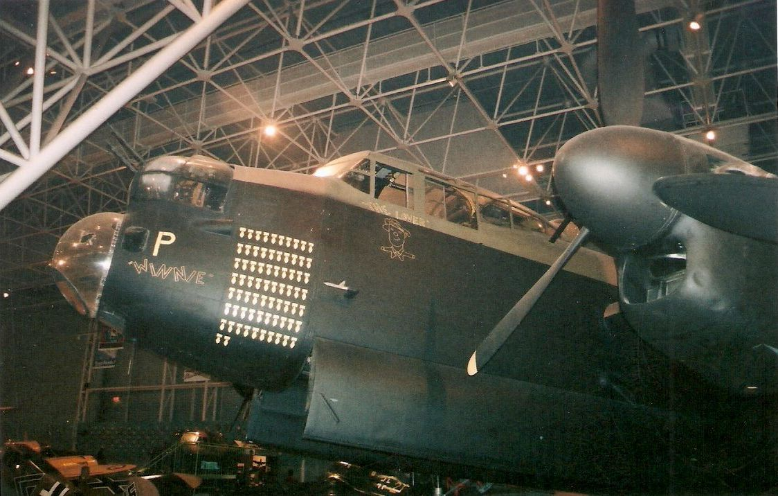 Un bombardier lourd Lancaster Mk.X de la Seconde Guerre Mondiale au Musée de l'Aviation et de l'Espace du Canada en 2010